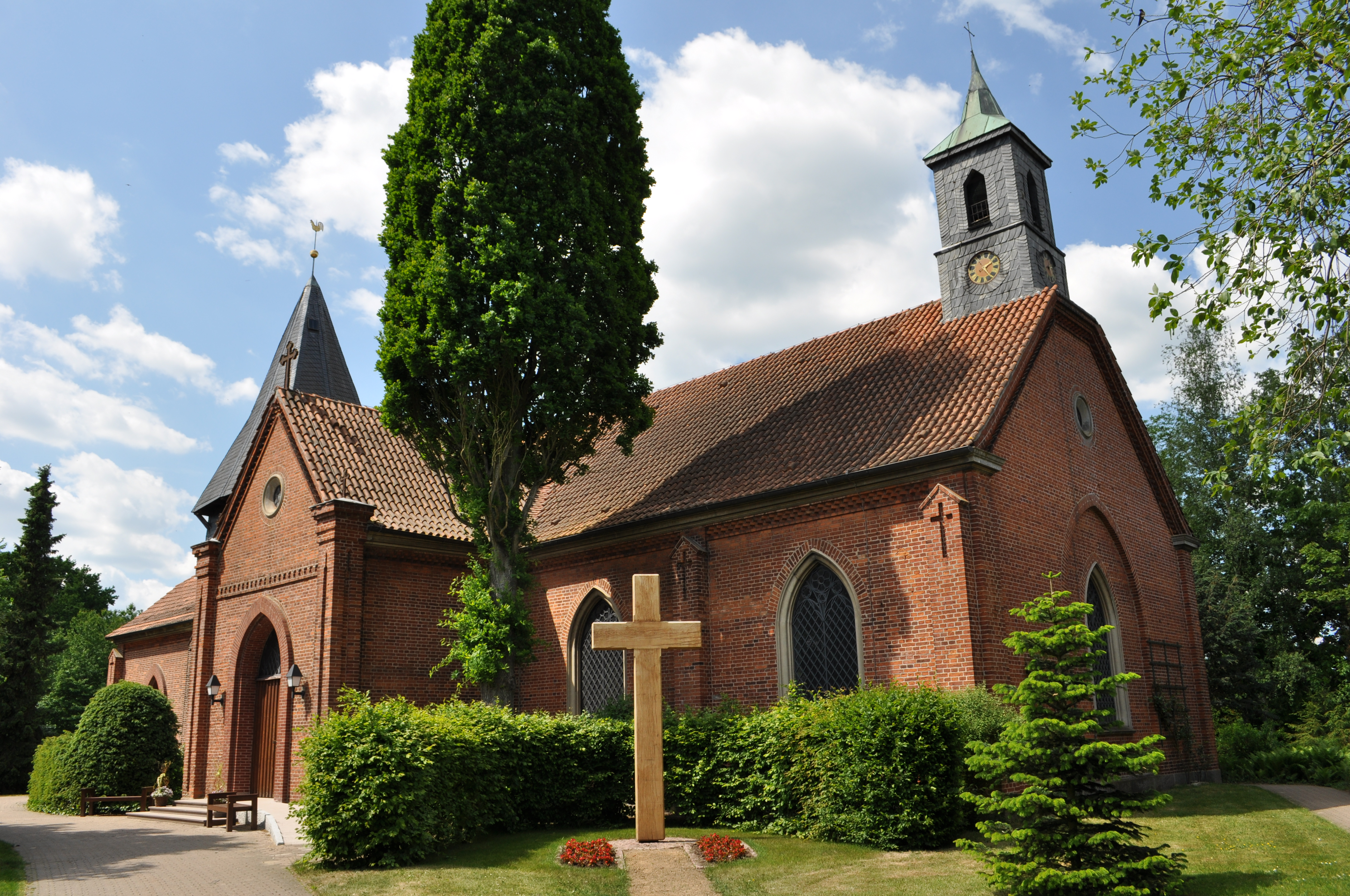 Blick von Südosten auf die Kirche von Leezen (Holstein). This is a photograph of an architectural monument. .1